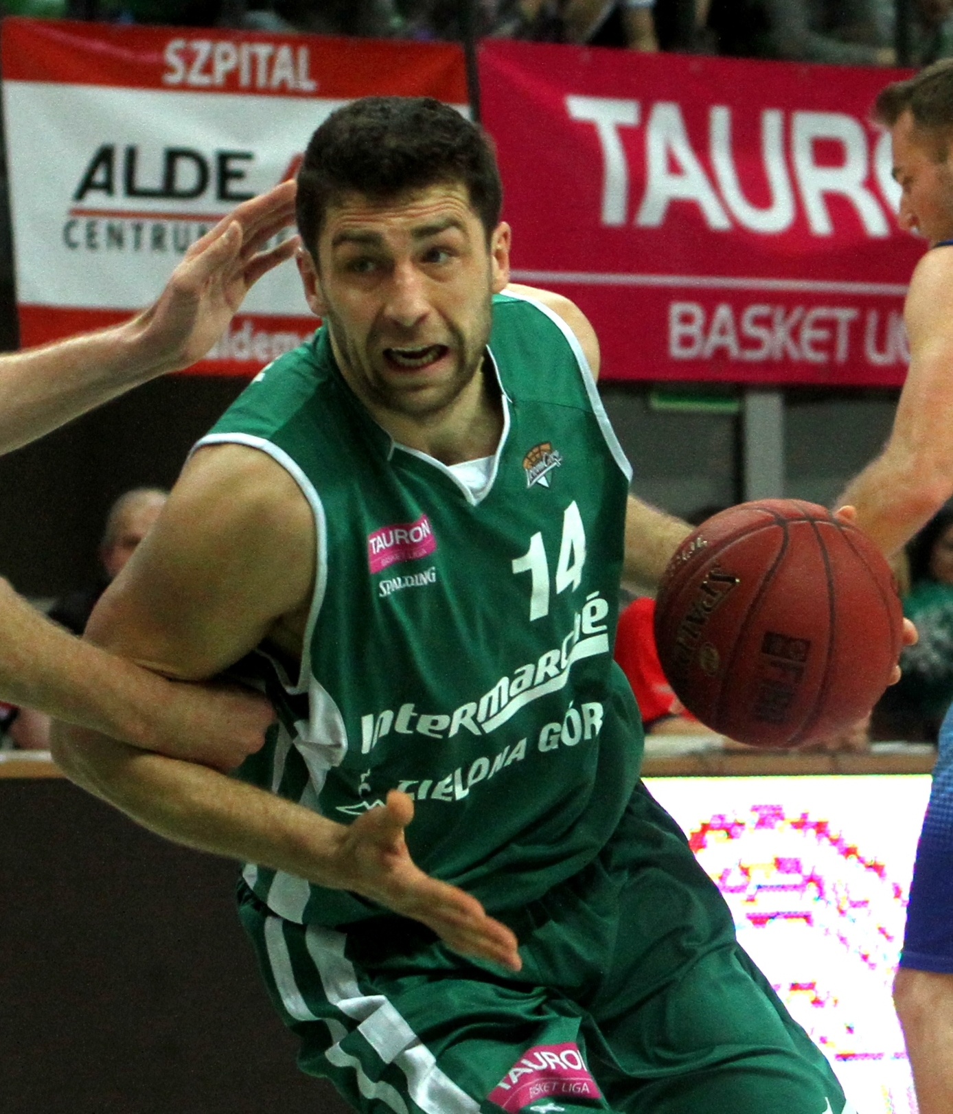 Rafał Bigus, Kotwica Kołobrzeg, Adam Hrycaniuk, Stelmet Zielona Góra